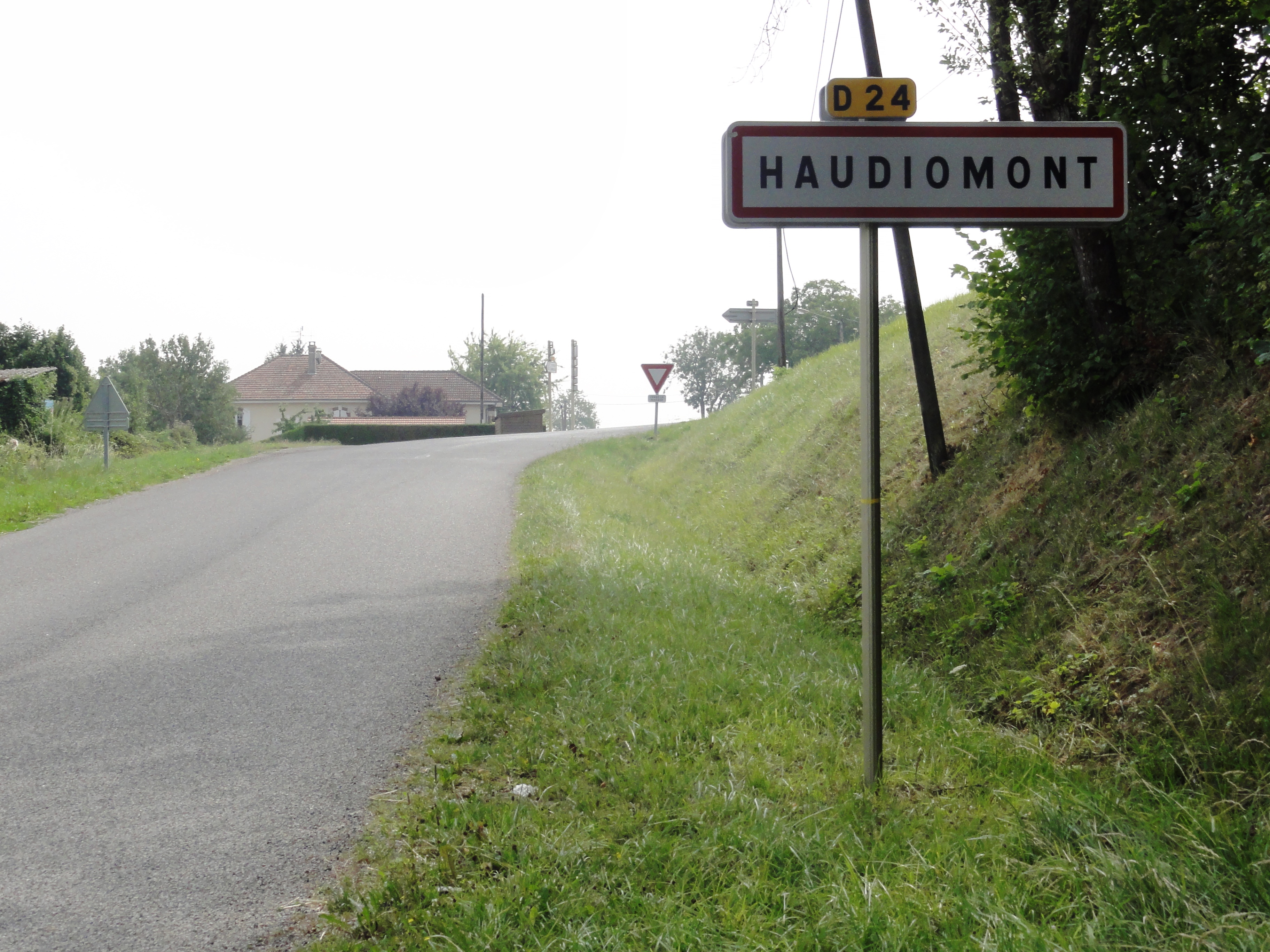 Haudiomont (Meuse) city limit sign